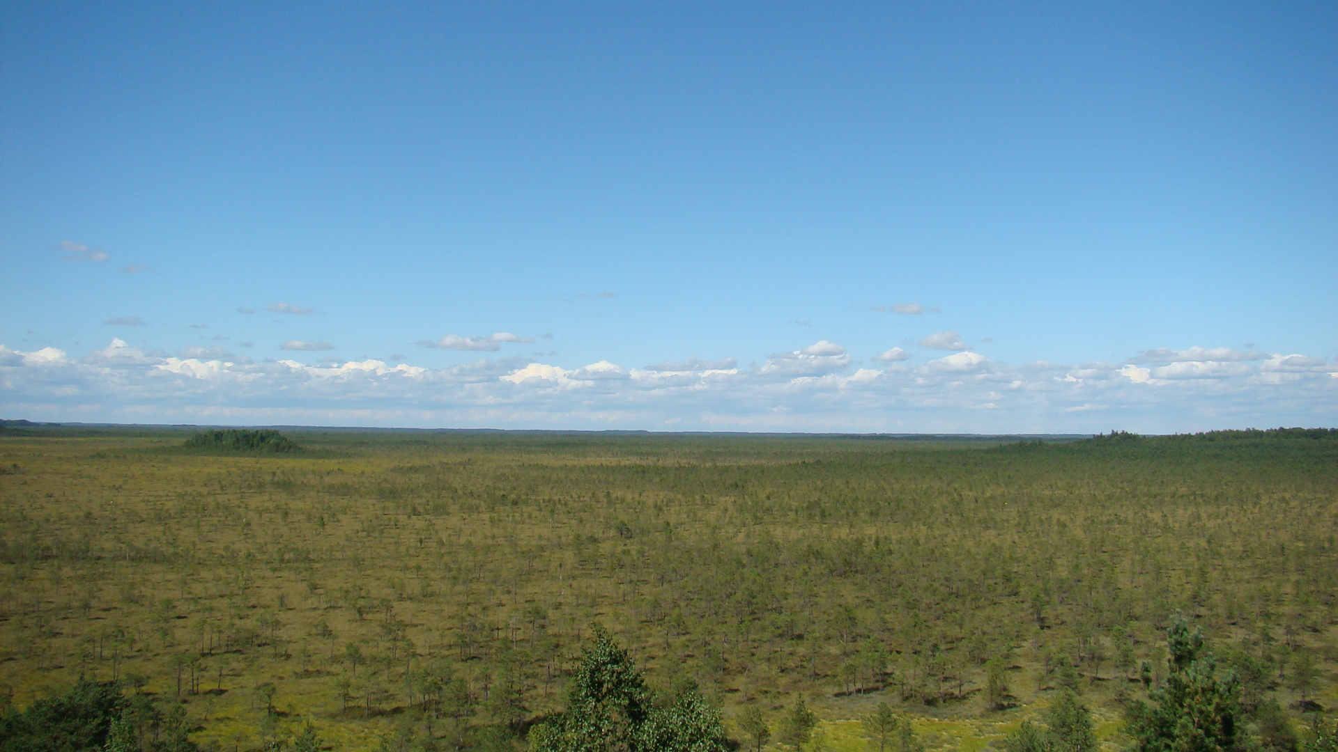 (Teiču purvs): Teiču purva skats no skatu torņa, kas uzbūvēts par Eiropas savienības atbalsta līdzekļiem.